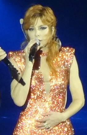 Mylène Farmer et Gary Jules lors du concert Timeless 2013, le 17 septembre 2013 à Paris-Bercy, France.